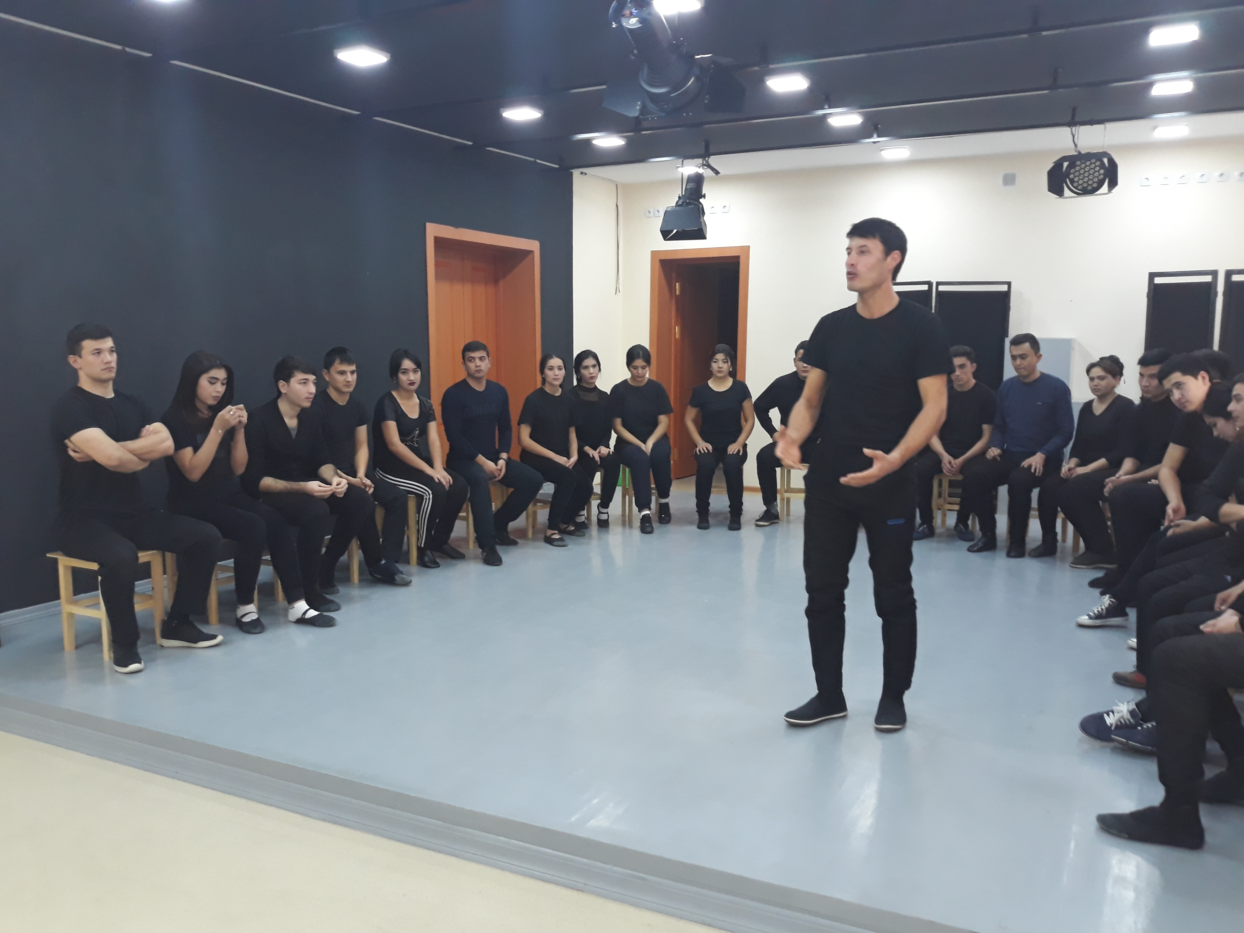 Oʻzbekcha/ўзбекча: Aktyorlik mahorati mashg'ulotlari